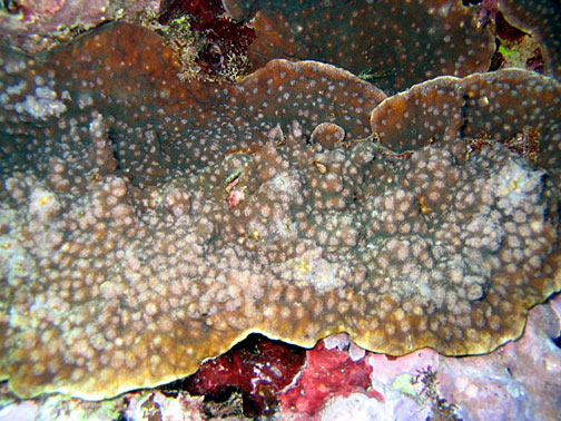 Echinopora gemmacea, Samoa Americana NP